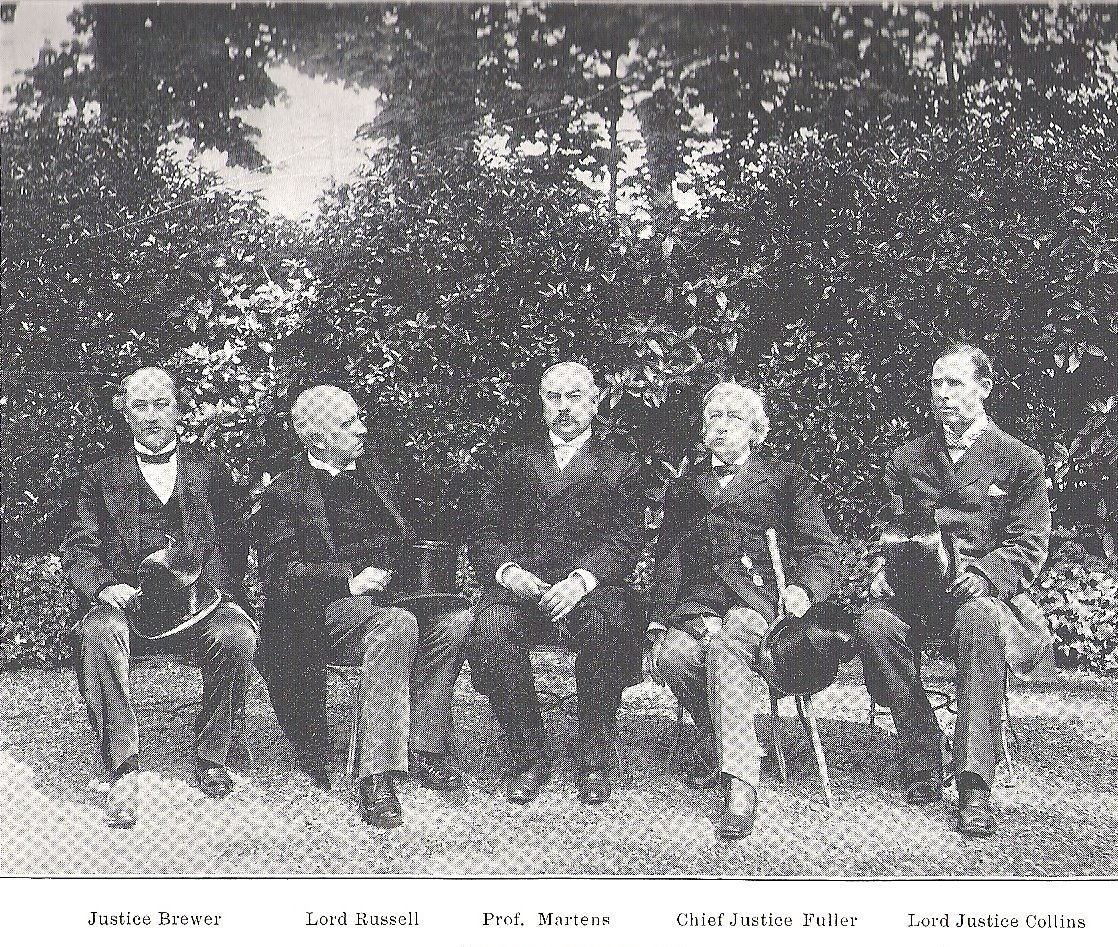 Representantes del Tribunal Arbitral de Paris de 1899 en Boulevard Saint-Germain, París, Francia. Colección de la Fundación La Guayana Esequiba.